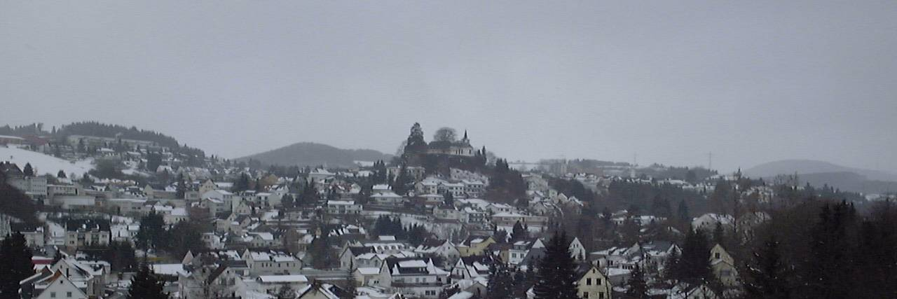 Winterpanorama von Daun/Eifel, Sicht vom Viadukt westwärts auf den Burgberg